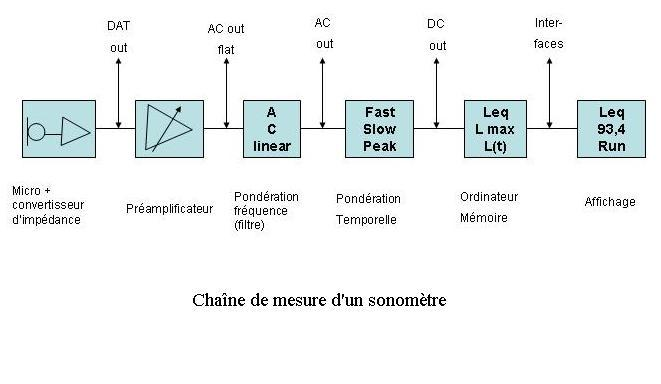 Description fonctionnement sonomètre